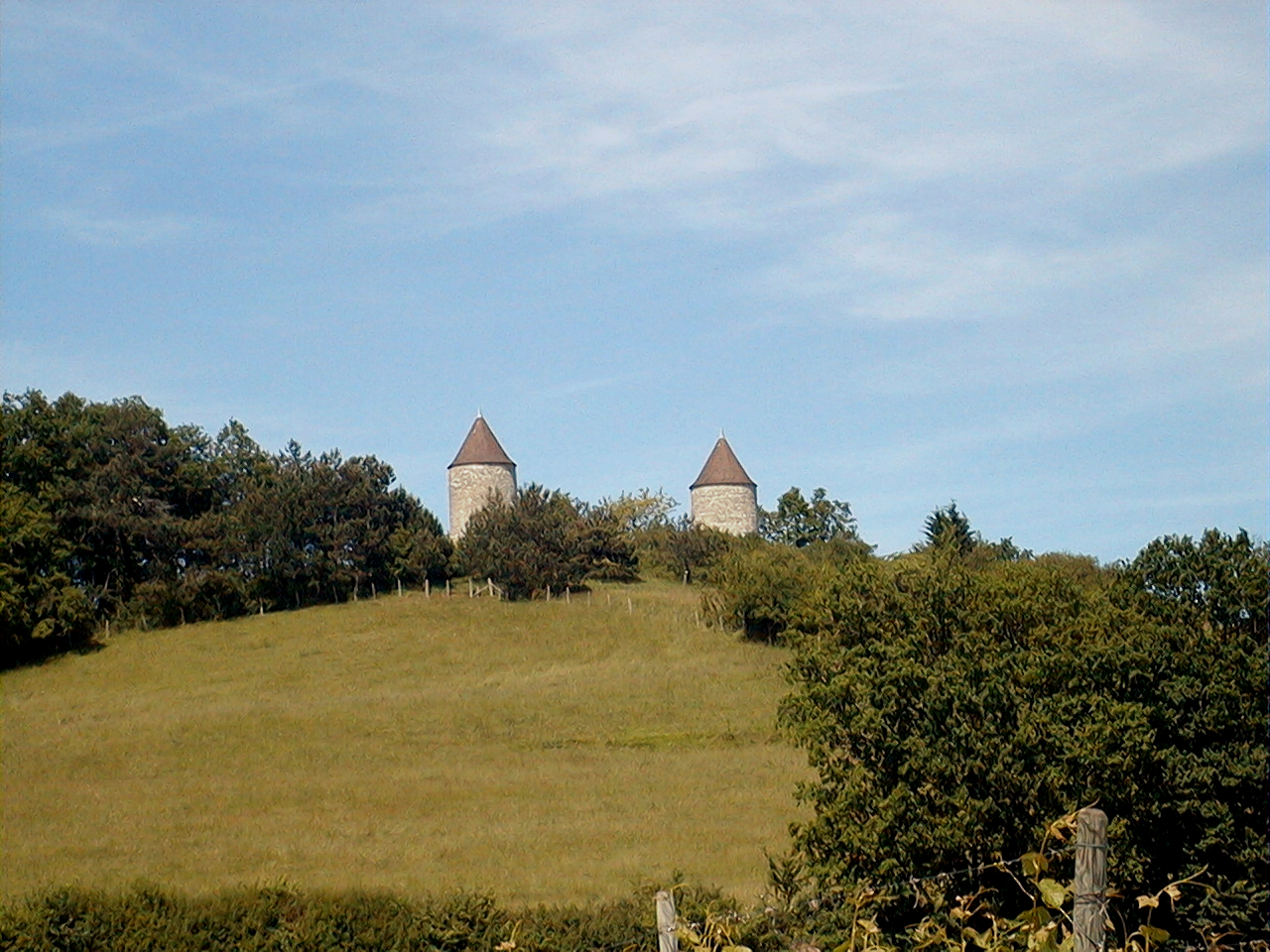 Les Moulins de Boisse